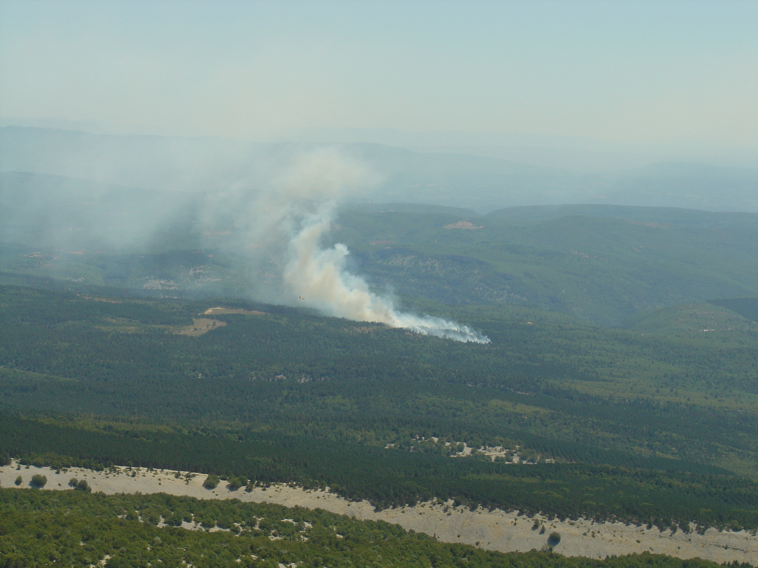 Canadairs (en petit) s'attaquant à un incendie de forêt à proximité de la route du col de Notre-Dame des Abeilles vus depuis le Mont Ventoux le 25/07/2009 lors du passage du Tour de France cycliste